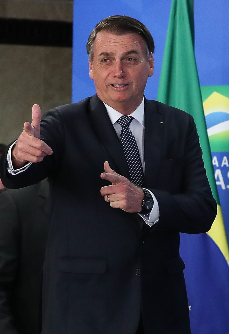 (Brasília - DF, 25/04/2019) Presidente da República Jair Bolsonaro chega ao local da solenidade. Foto: Marcos Corrêa/PR